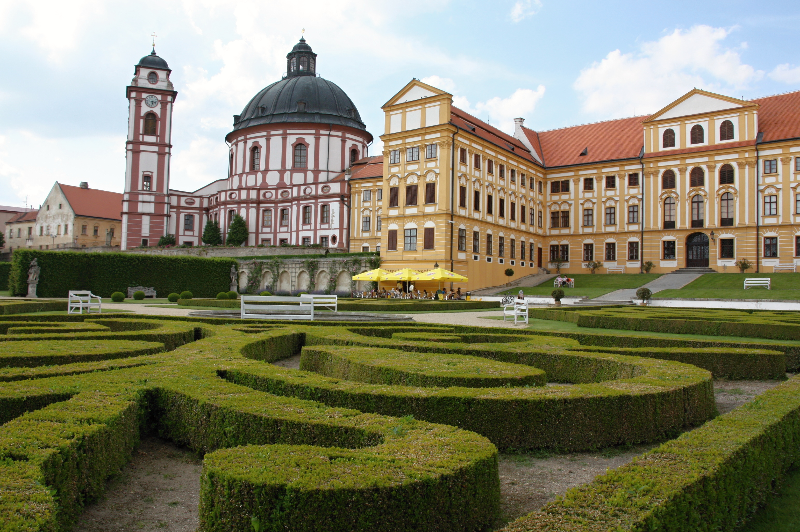 Zámek Jaroměřice nad Rokytnou, nám. Míru 1, Jaroměřice nad Rokytnou